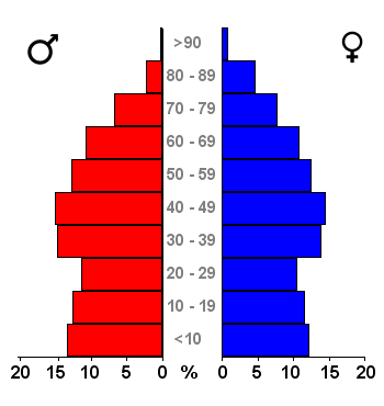 Age pyramids for the 443 municipalities in the Netherlands. Data 2007. Statistics provided by Centraal Bureau voor de Statistiek, Voorburg/Heerlen. Source: Tabel: Bevolking Nederland per gemeente en diverse regio's naar leeftijd, geslacht en burgerlijke staat, 1 januari 1988-2007. Gewijzigd op 24 mei 2007 (on-line database StatLine) Bevolkingspiramide - Gemeente Sneek (2007).png